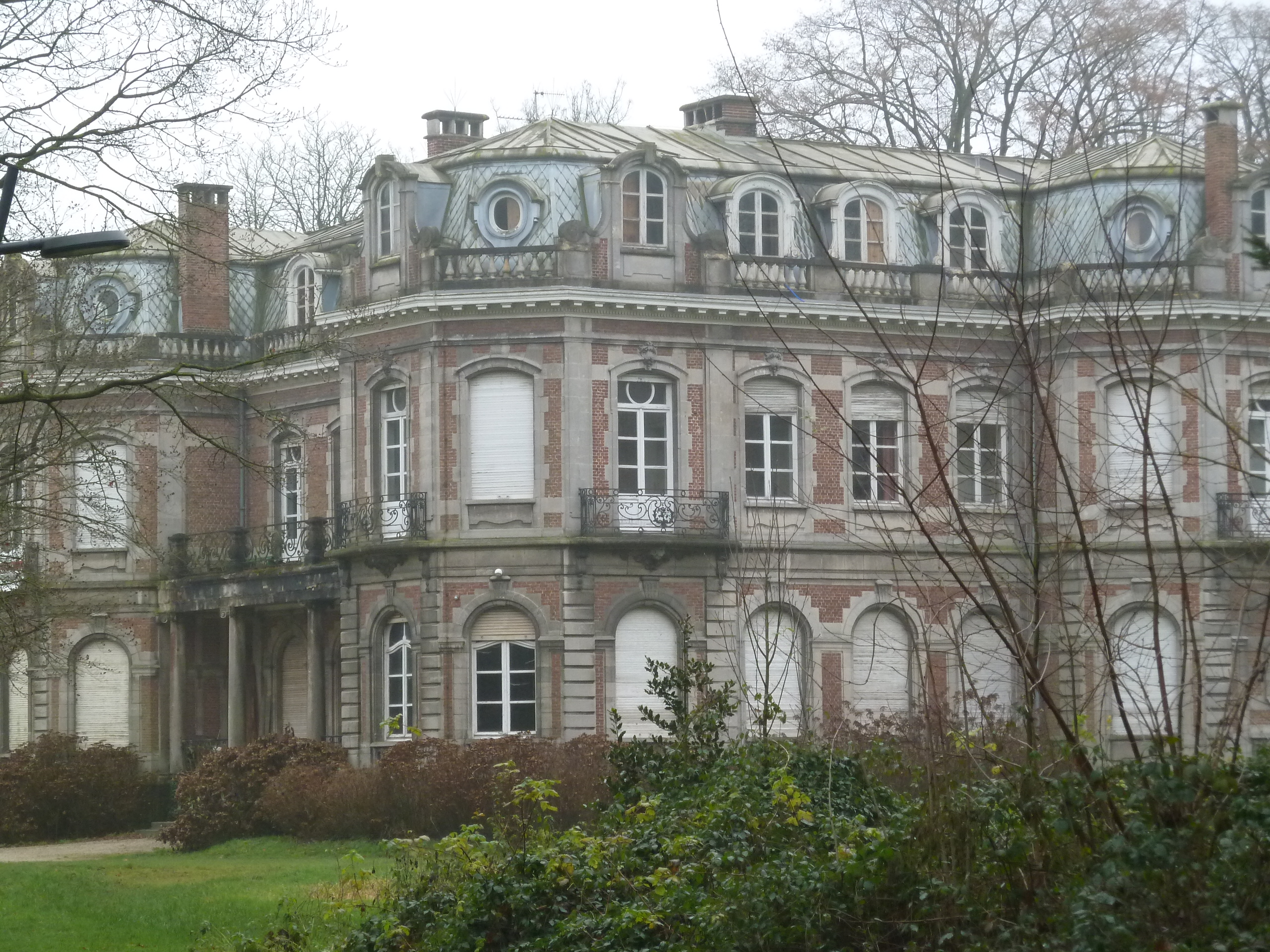 Kasteel Wolvenhof